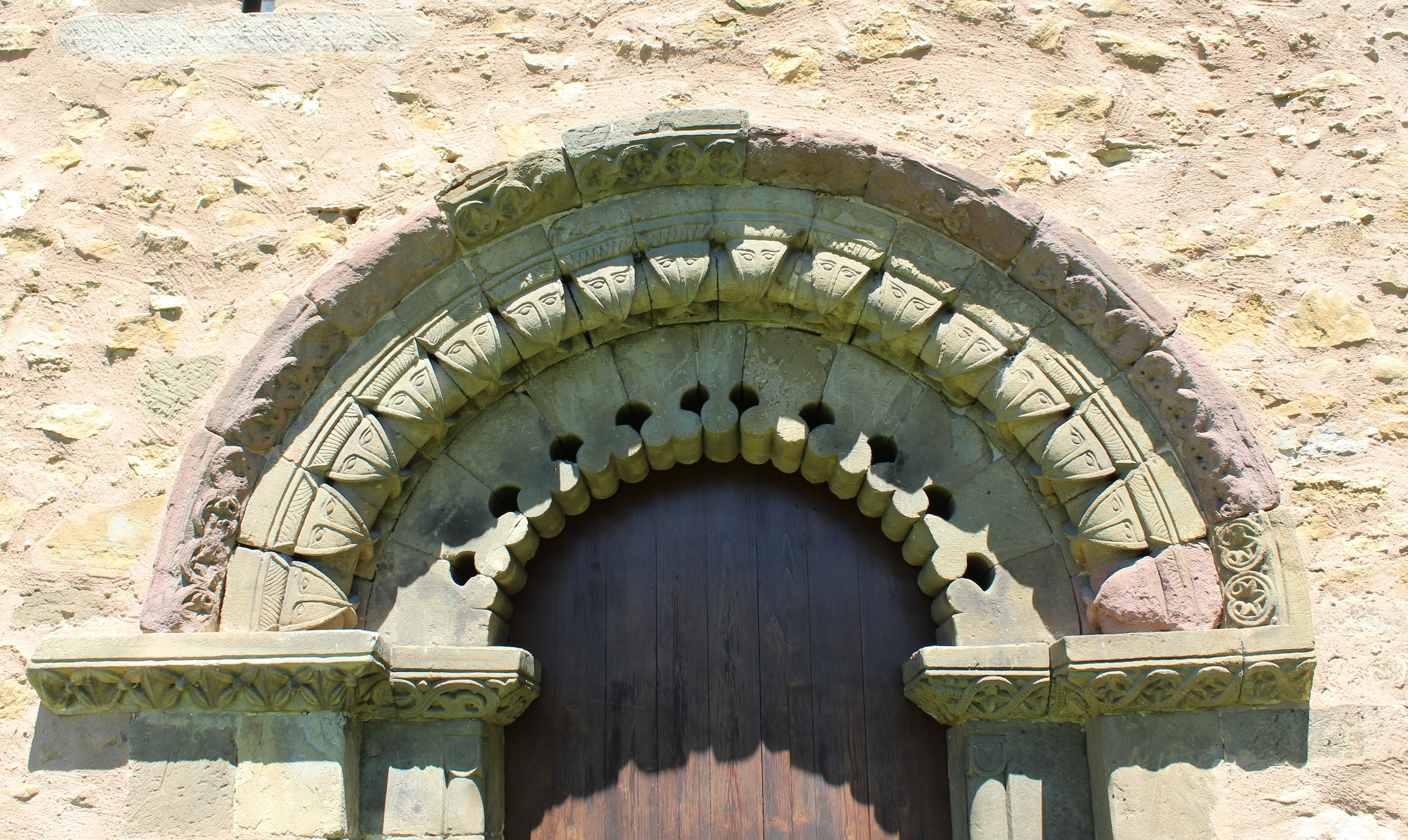 Arco del pórtico al sur